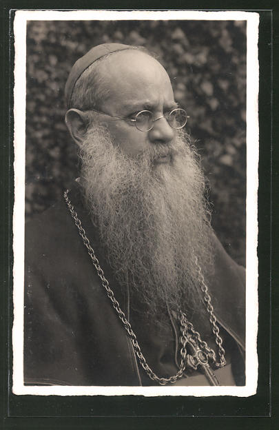 Mgr Gabriel Zelger O.F.M. Cap., vicaire apostolique de Dar-es-Salam.